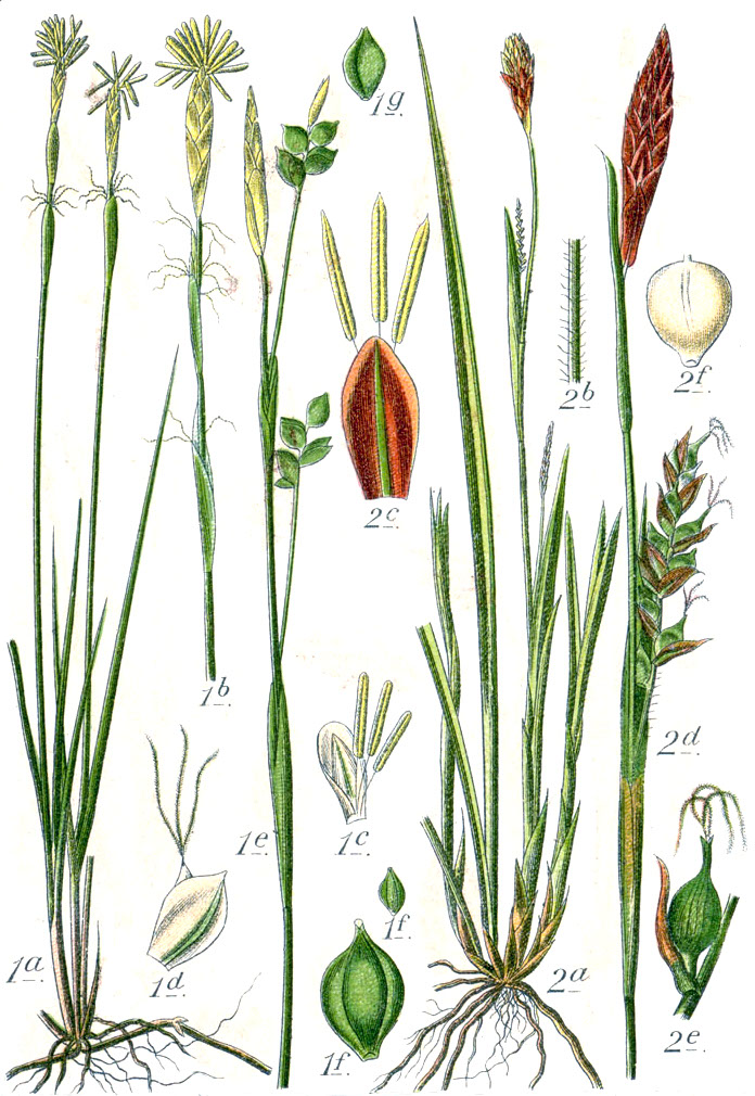 1. Carex alba Scop. 2. Carex pilosa Scop. Original Caption 1. Weisse Segge, Carex alba 2. Wimper-Segge, C. pilosa